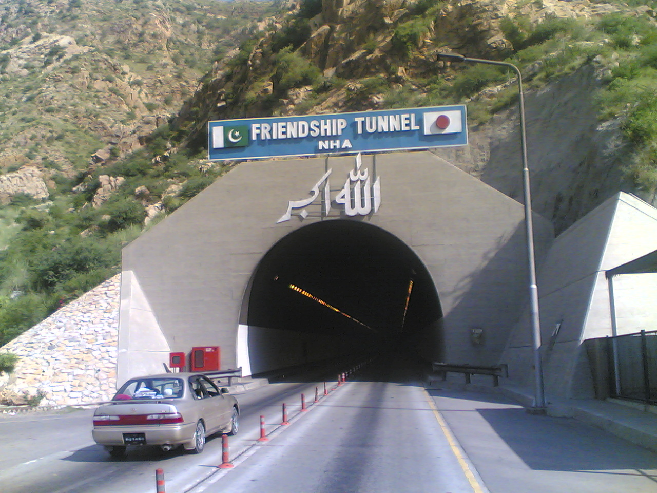 kohat tunnel